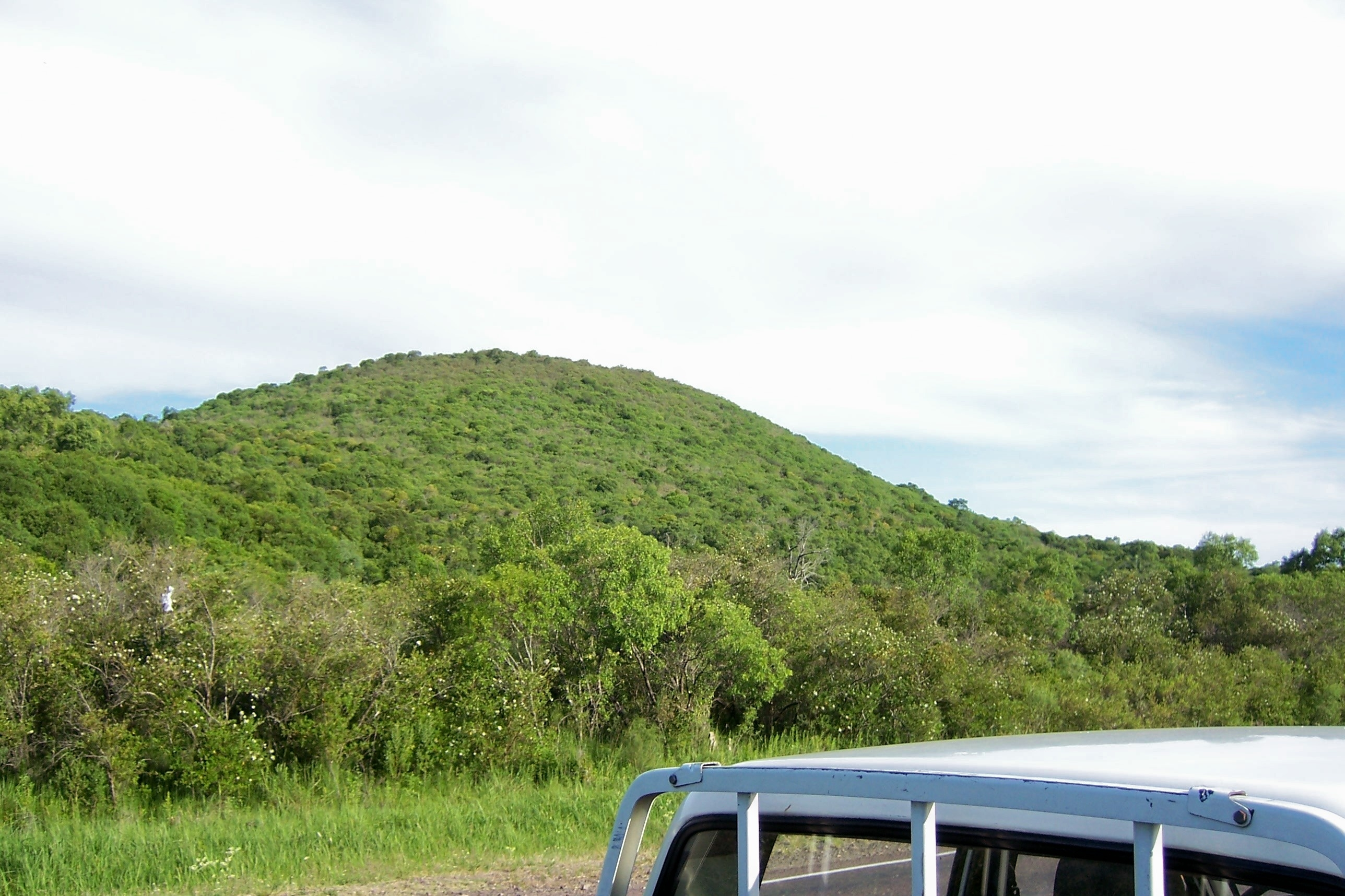 Bosque de quebrada, vista desde la Ruta 26, próximo a Valle Edén (departamento de Tacuarembó, Uruguay).